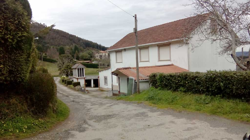 Vista de Fontela, Mandiá, Ferrol.